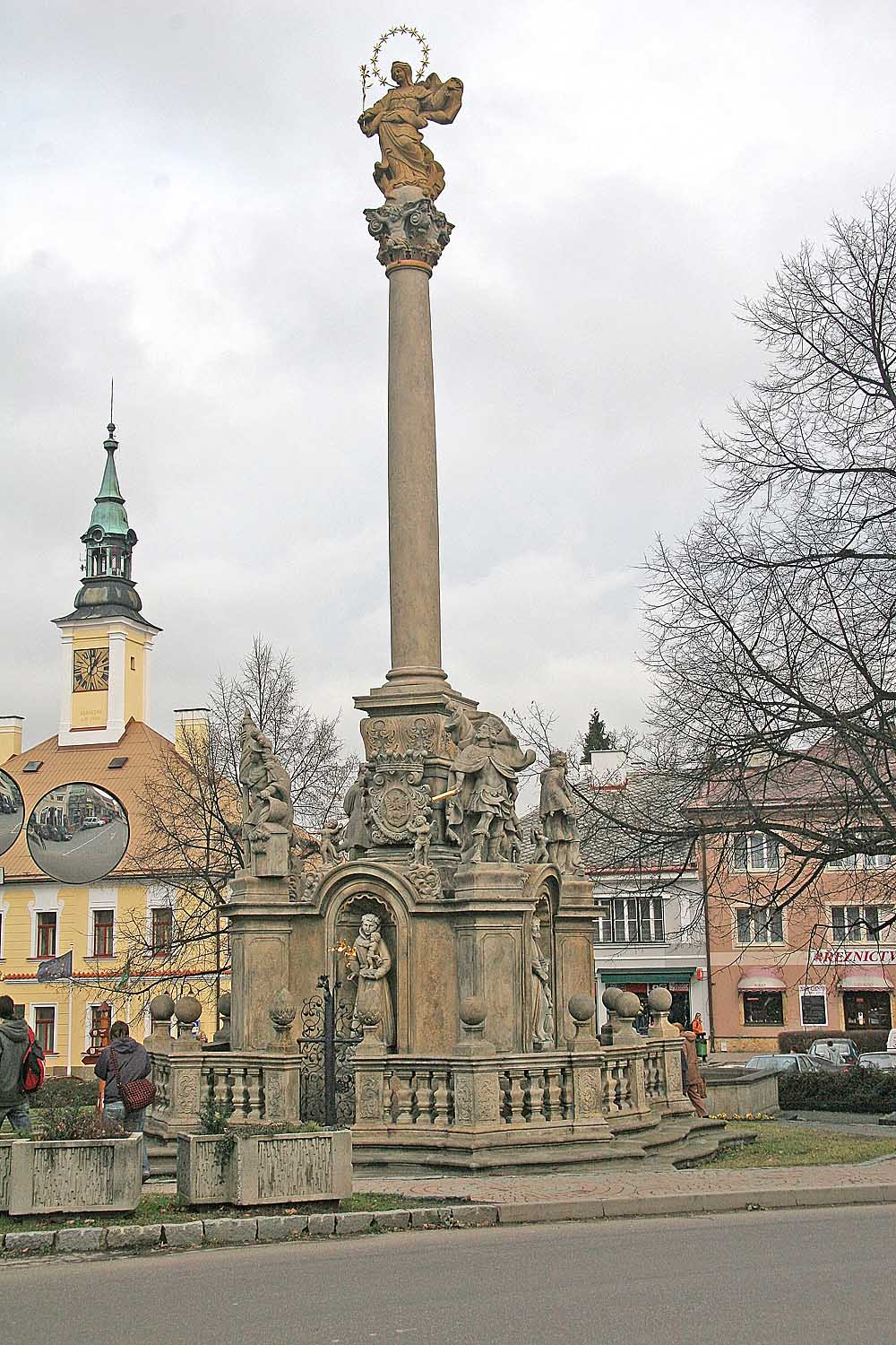 Mariánský sloup v Žamberku, district Ústí nad Orlicí autor: Prazak date: 21. 11. 2006